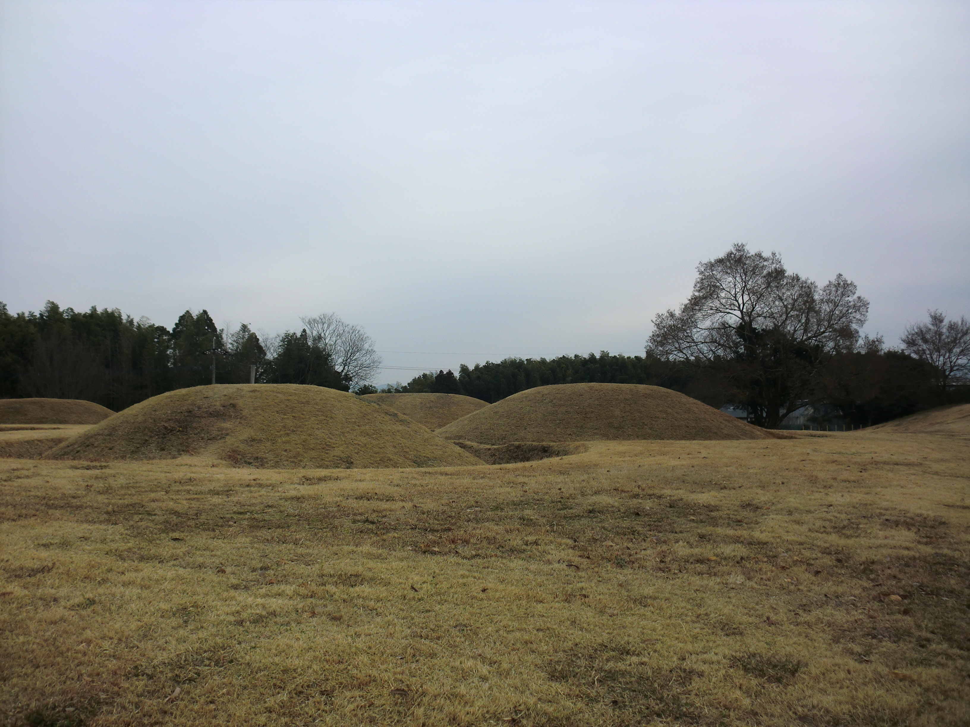 熊本市南区にある塚原（つかわら）古墳公園